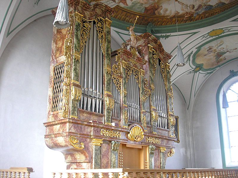 Pfarrkirche St. Vitus (Egling an der Paar, Landkreis Landsberg am Lech, Oberbayern). Die Orgel. Eigene Aufnahme, Okt. 2006 / Parish church St. Vitus (Egling an der Paar, Upper Bavaria, Germany). The organ. Own photo, Oct. 2006